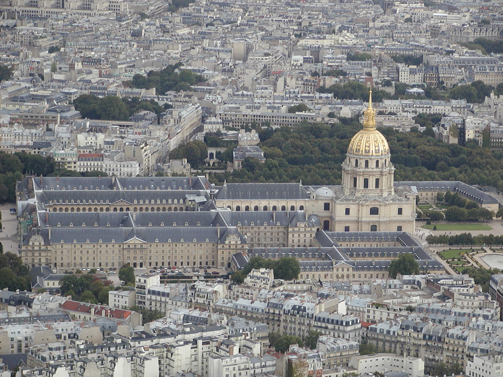 Vue depuis la Tour Eiffel, l'Hôtel des Invalides, Paris, France.